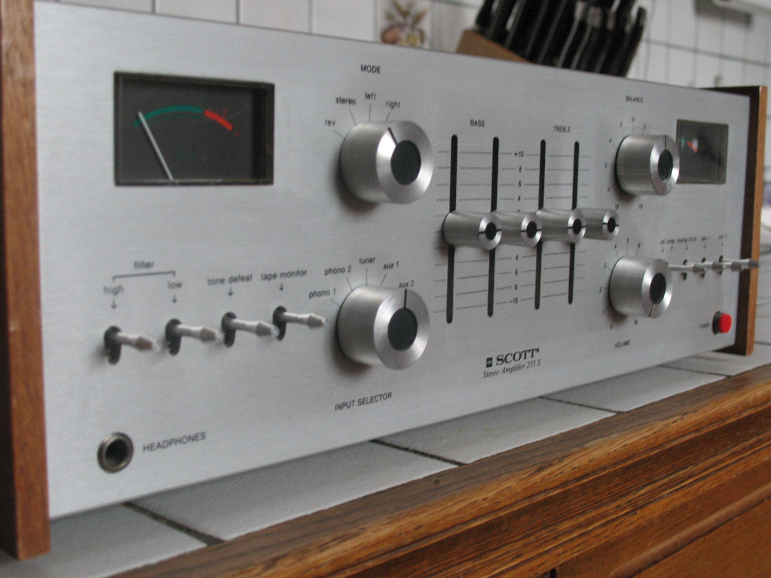 Ampli scott 255s avec vumètres 1